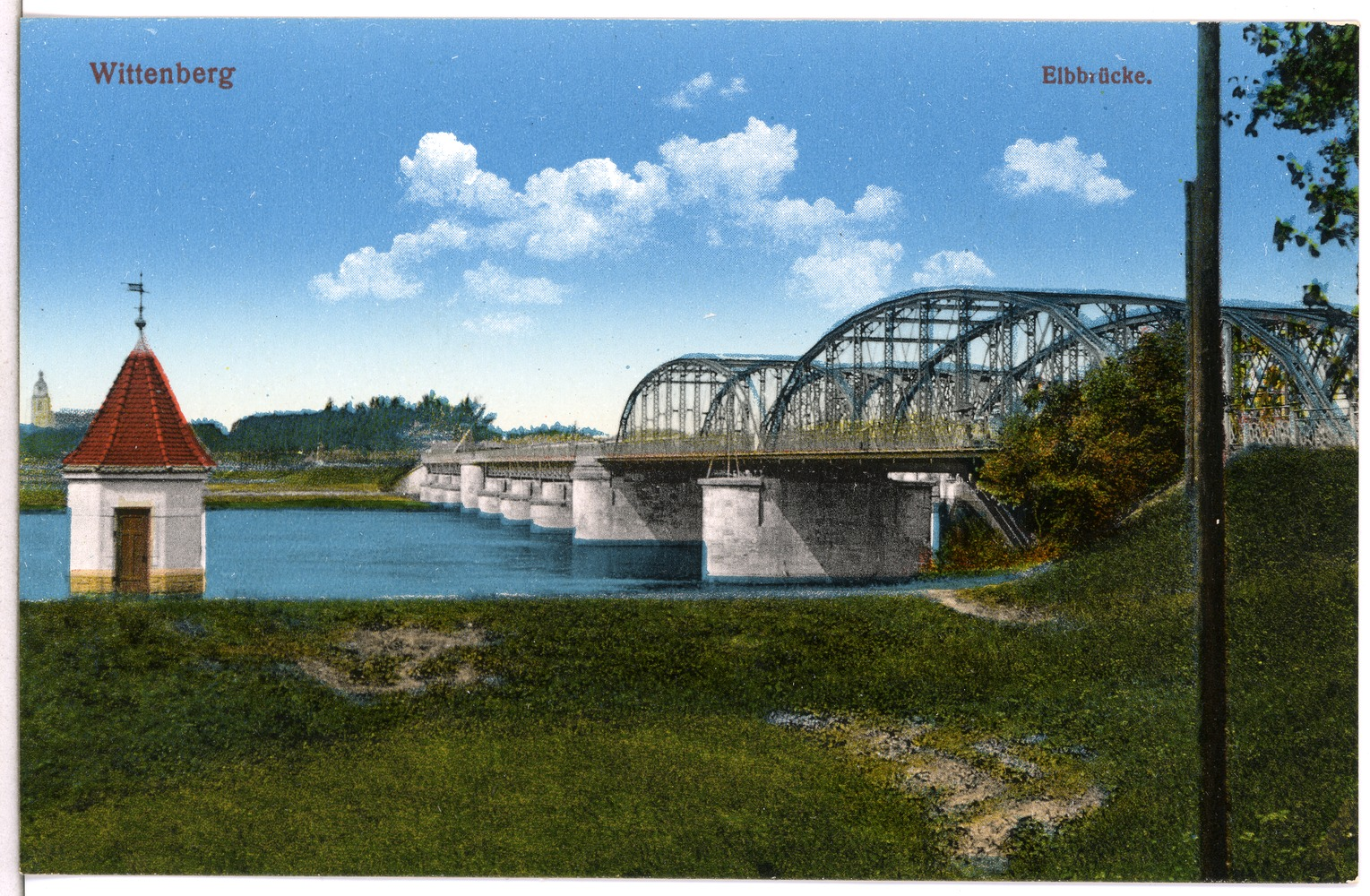 Wittenberg; Elbbrücke This postcard is from publisher Brück & Sohn in Meißen ( postcard has a unique number 15163 and is available in a higher resolution at the publisher. This images was uploaded in a cooperation project between Wikipedians and the publisher. Auffälligkeiten Verglichen mit File:18136-Wittenberg-1914-Elbe mit Schleppzug und Brücke-Brück & Sohn Kunstverlag.jpg und der Aussage in Elbebrücke Wittenberg (Straße), dass 1907 die hölzernen Überbauten im Vorlandbereich durch eiserne Vollwandträger ersetzt wurden, könnte die Aufnahme bereits vor 1907 datieren (unabhängig davon, wann die Postkarte ausgegeben wurde). Zudem sind für den Oberbau auf der stromaufwärtigen Bahnbrücke im Hintergrund noch keine parallelgurtigen, eisernen Fachwerkträger zu sehen, die laut Elbebrücke Wittenberg (Eisenbahn) bereits 1906 im Vorlandbereich montiert wurden und auf der Postkarte von 1914 deutlich im rechten Bildbereich zu sehen sind; diese müssten durch die gewählte Perspektive von der Straßenbrücke komplett verdeckt sein, falls diese Aufnahme tatsächlich nach 1906/1907 datiert.